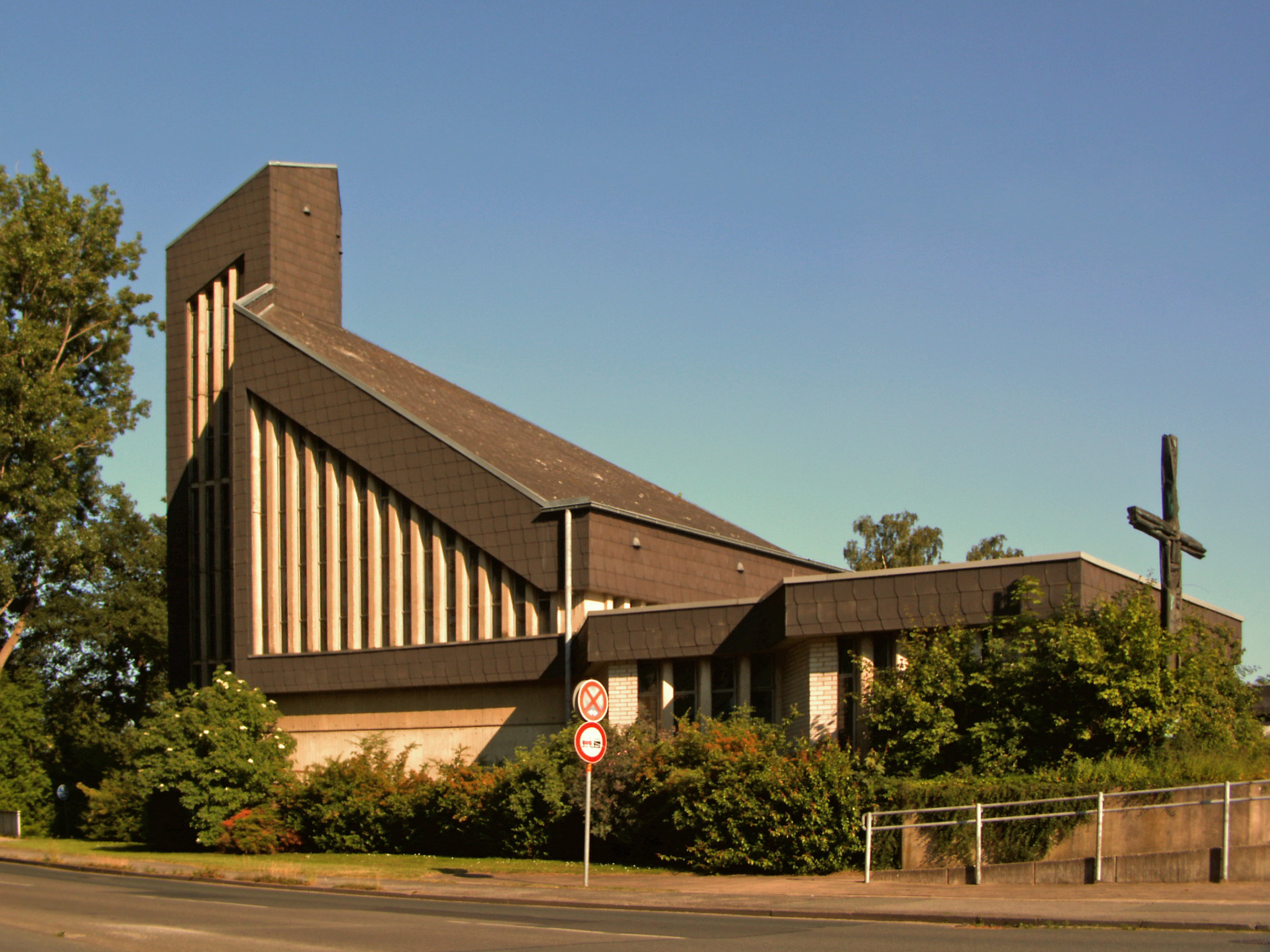 Katholische Kirche St. Johannes Bosco in Hemmingen, Region Hannover